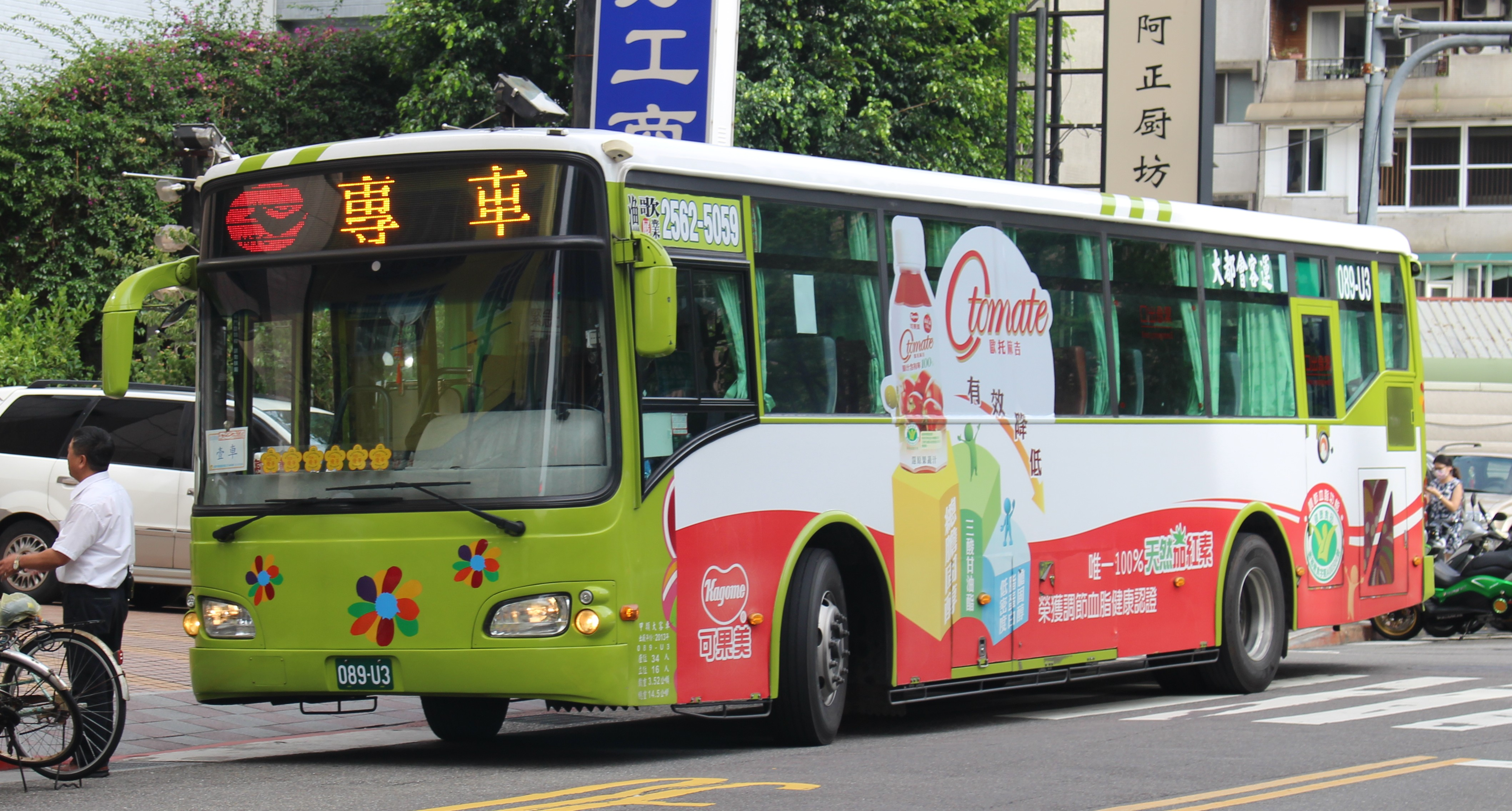 2014 HINO RK8JRVA-KJF 089-U3